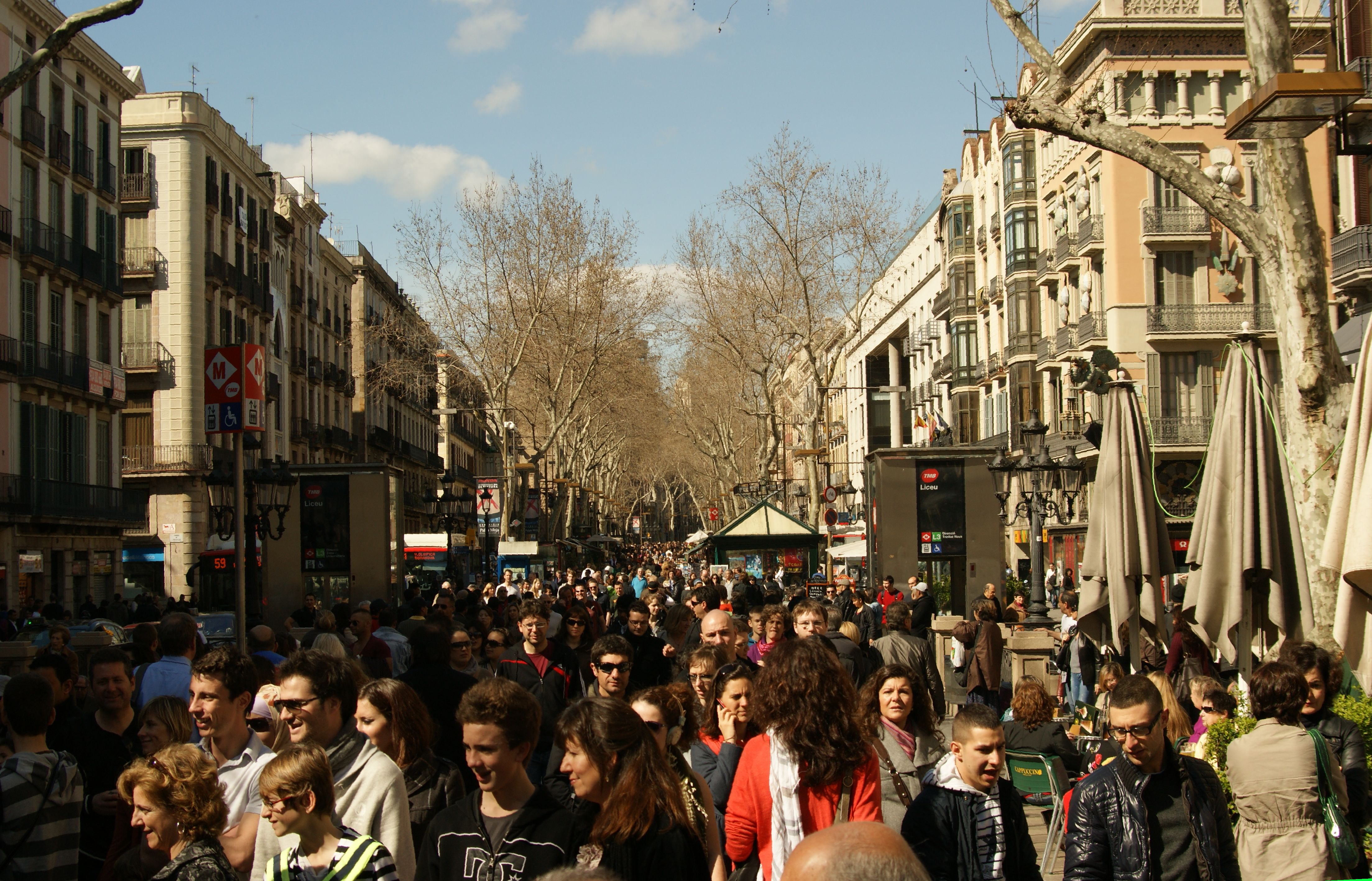 La Rambla